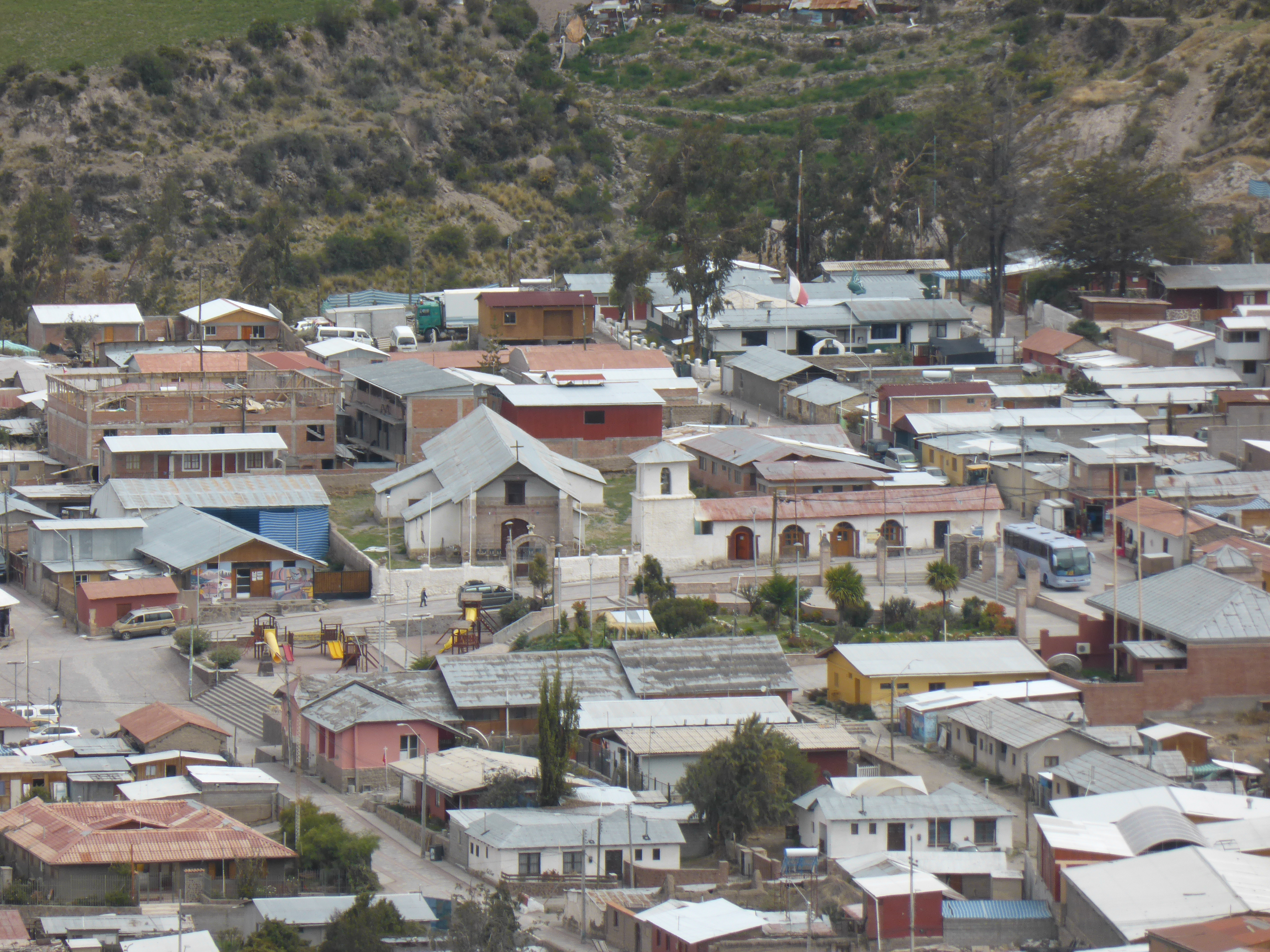 Desde el mirador "Alto de Putre", aproximación con zoom de 40x. Se divisa la iglesia y su torre-campanario.